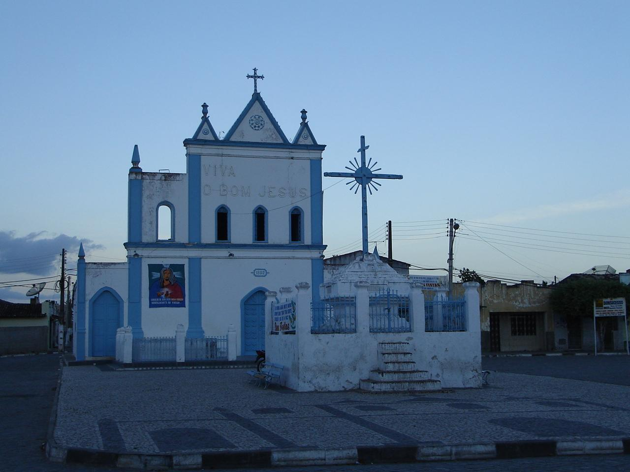 Foto tirada por mim, Itamar Matos (Ita) no dia 19/12/2005 às 17:34h, na última visita à cidade de Crisópolis. Câmera usada: DSC S40.